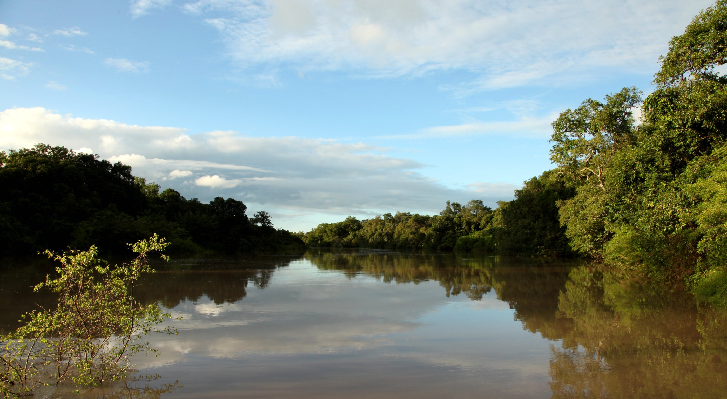 Kainji National Park, Nigeria